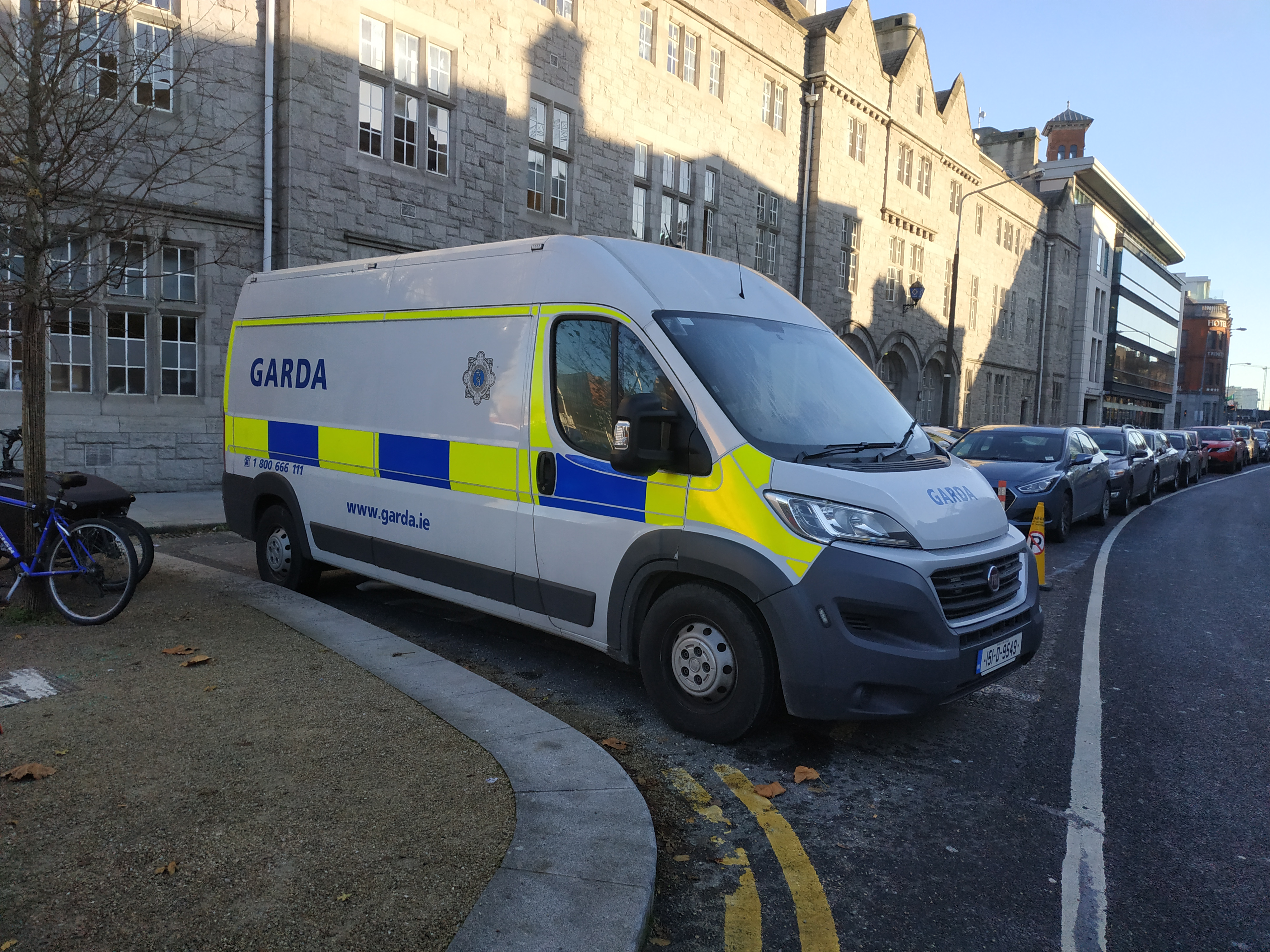 Van Fiat Ducato de la Garda à Dublin